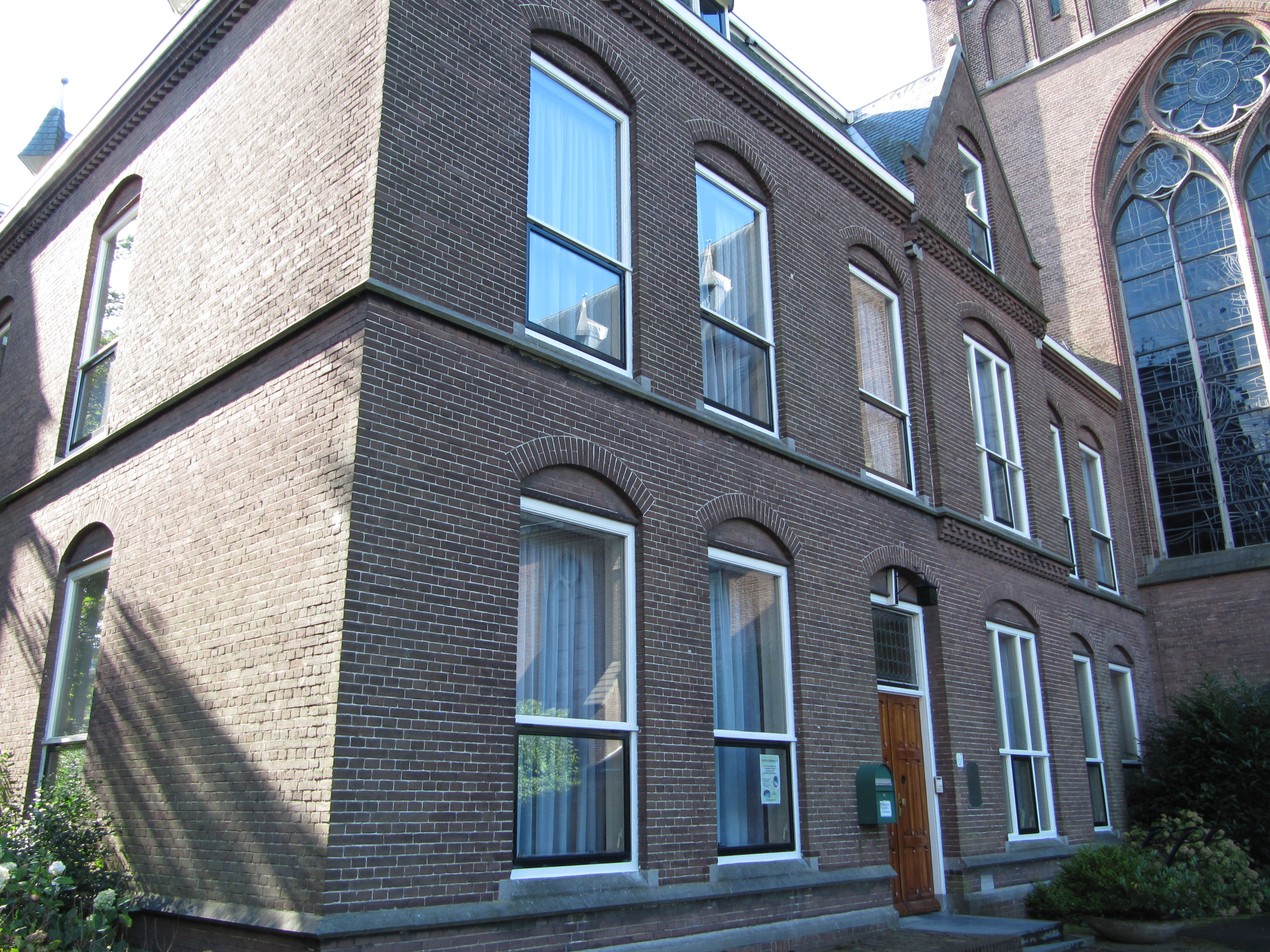 RM518122 Rijswijk - Pastorie.jpg